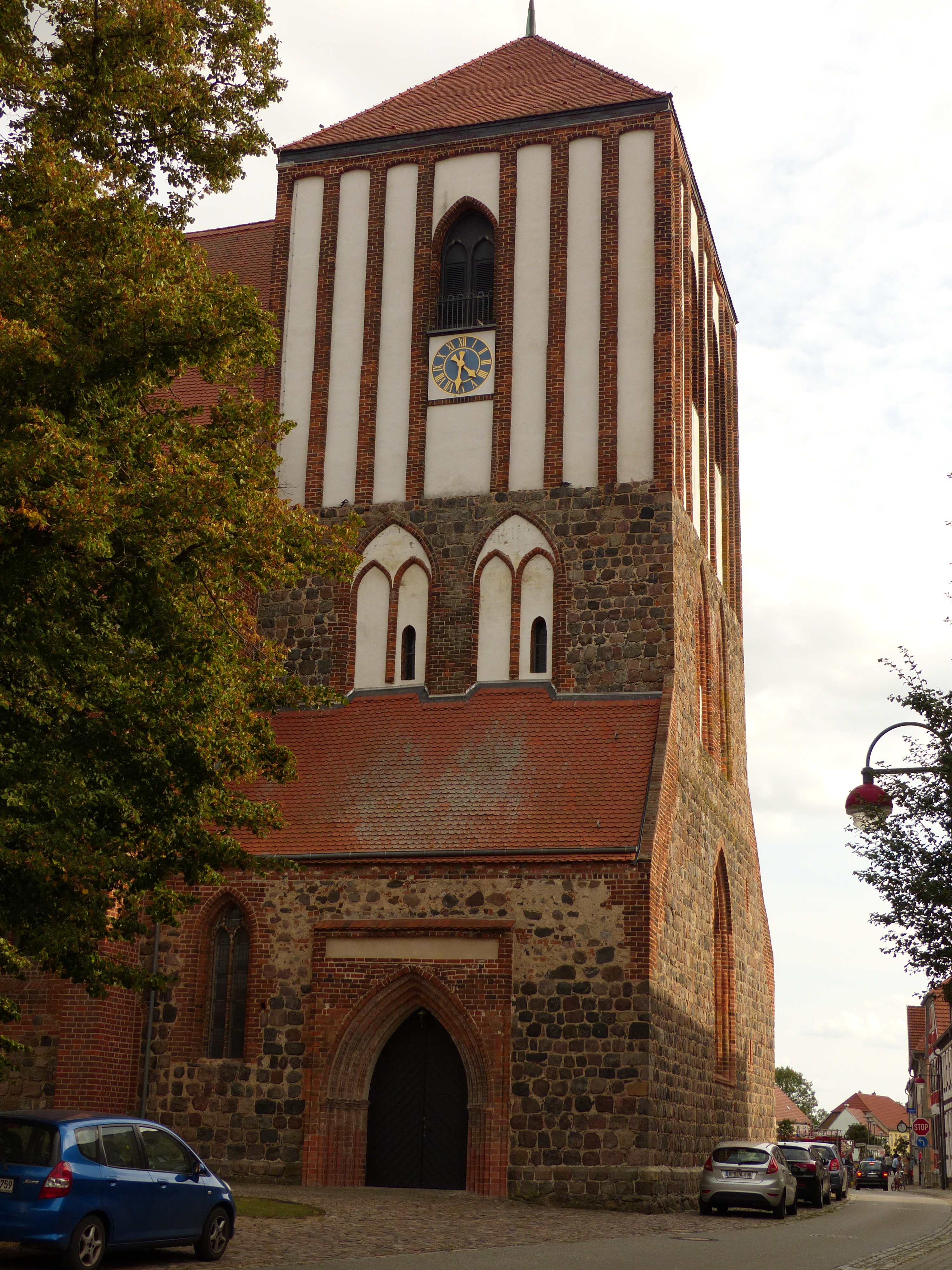 Wustergausen an der Dosse, Stadtkirche, Turm von N